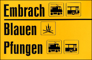 Wanderwege in Embrach